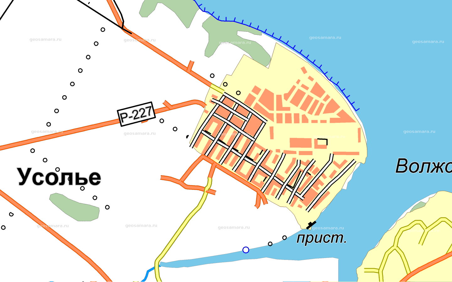 План села Усолье Шигонского района Самарской области - Фрагмент карты Самарской области с сайта Геопортала